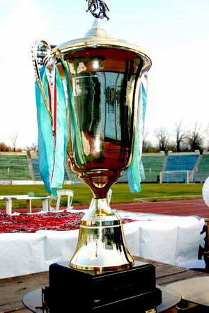 Кубок Узбекистана